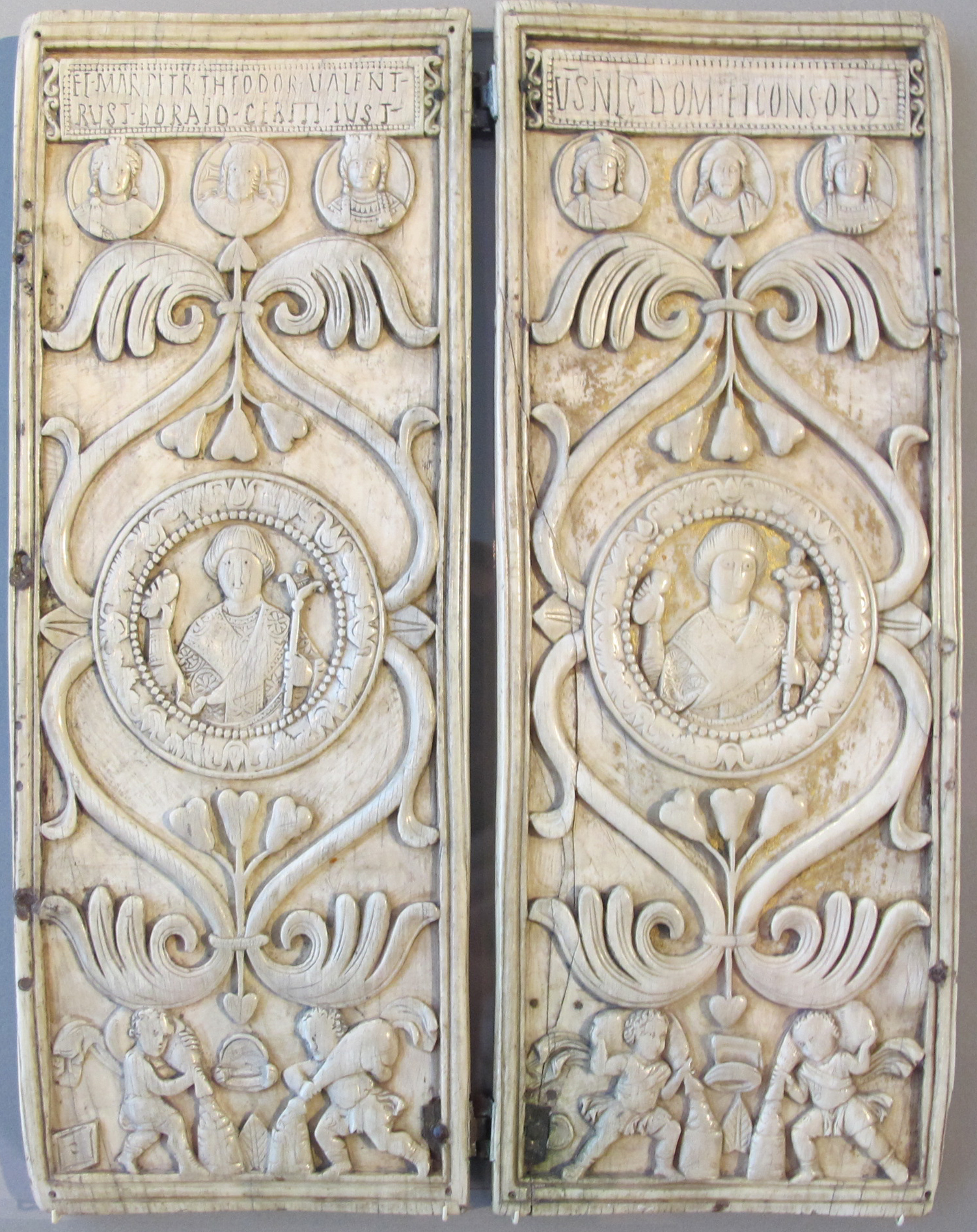 Dittico consolare di giustino, costantinopoli, 540